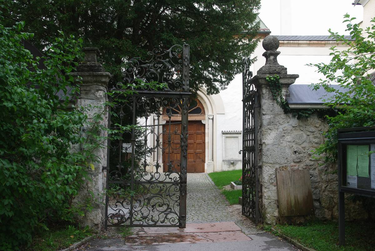 Südeingang des Friedhof St. Zeno in 83435 Bad Reichenhall. Im Hintergrund das Hauptportal der Pfarrkirche St. Zeno. This is a photograph of an architectural monument.